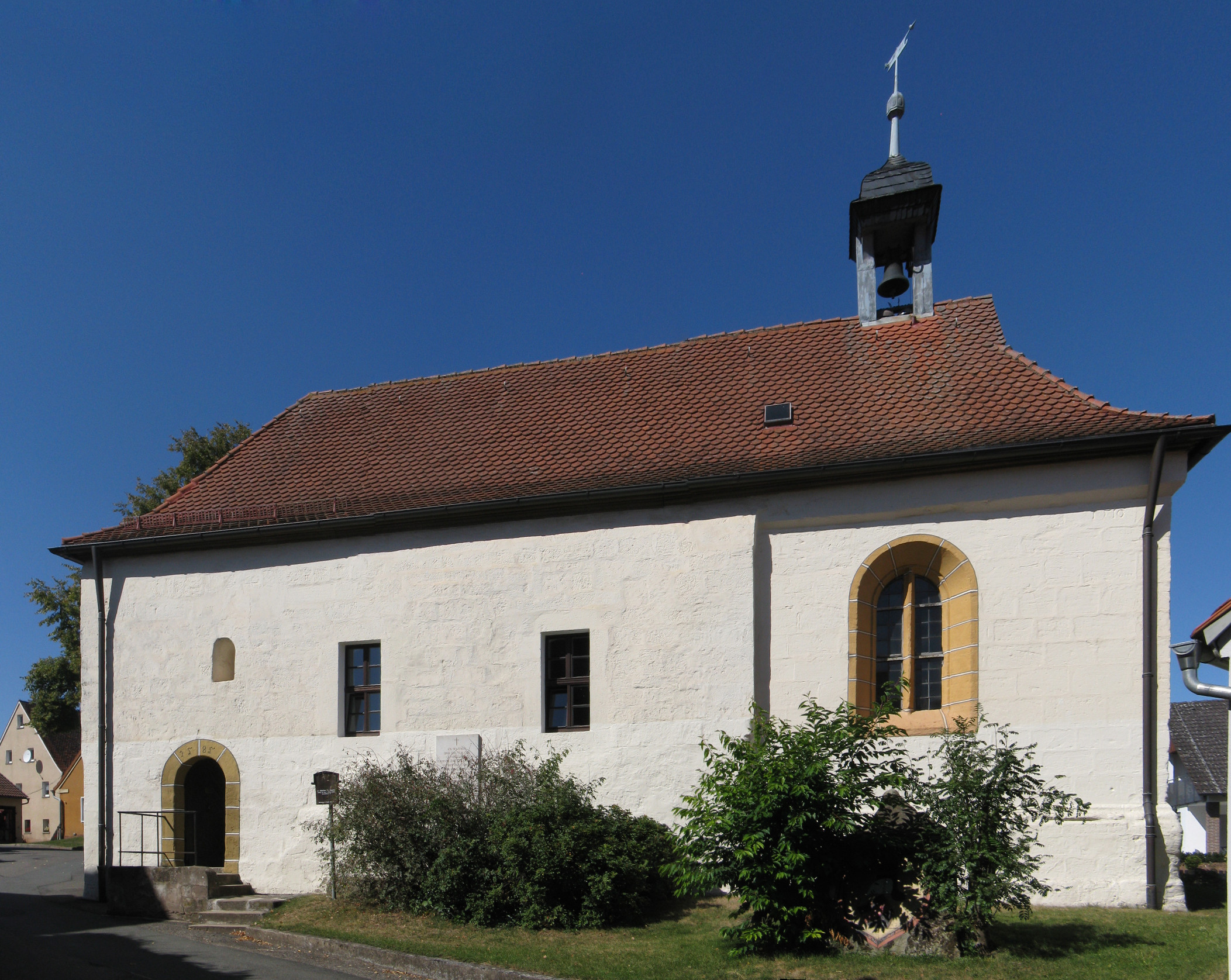 Evangelische Kirche Sankt Jakob/Sankt Aegidius im Ortsteil Buttendorf von Roßtal. 14. Jahrhundert, Chor 1510, Renoviert 1779